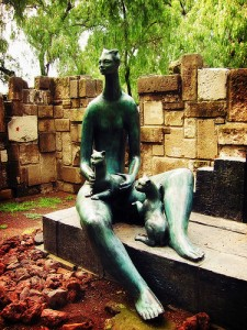 El Gato. Parque de las Esculturas por Charlotte Yazbeck, en Cuautitlán Izcalli, Estado de México.